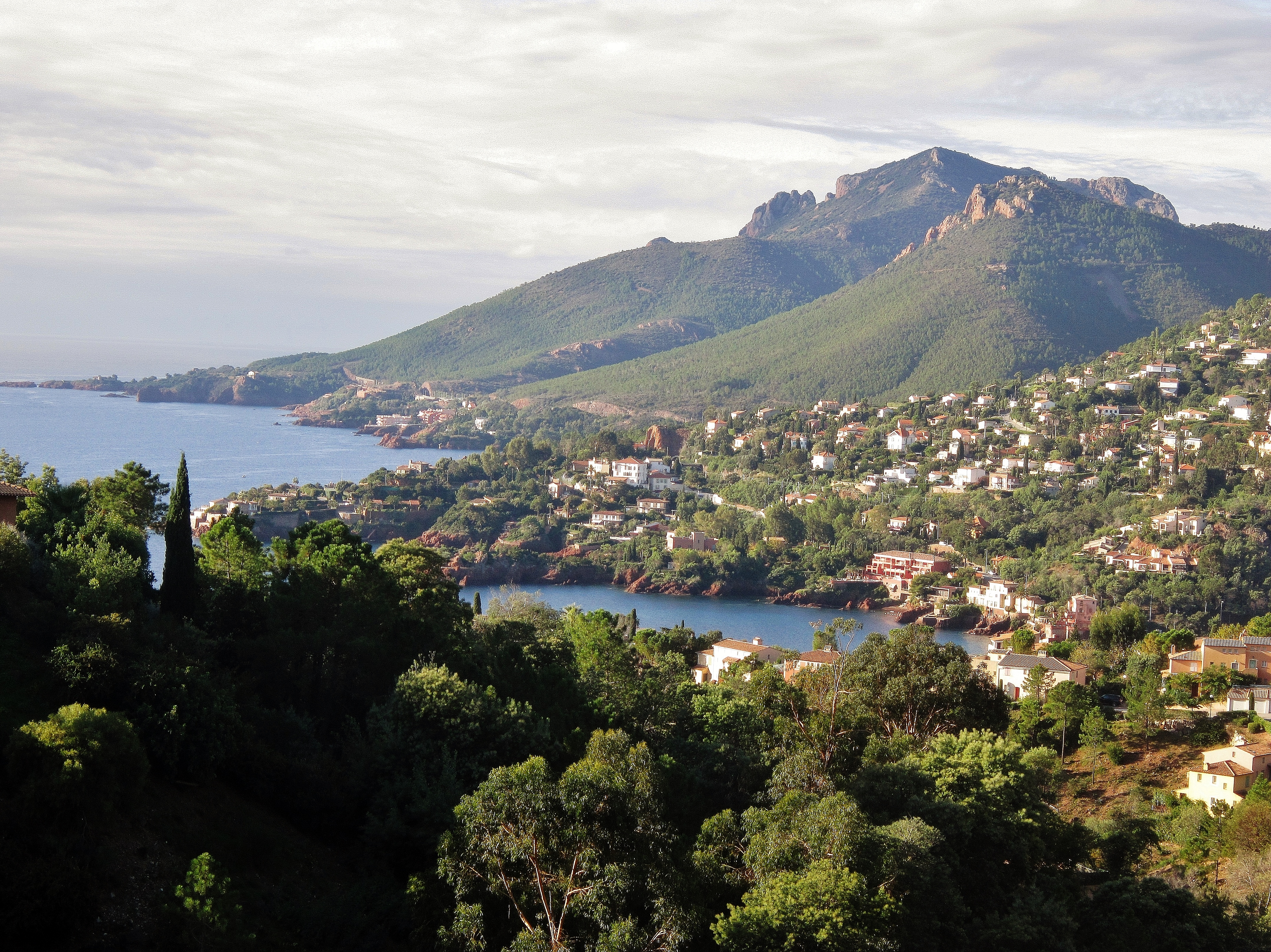 Théoule-sur-Mer : la calanque de la Figueirette, la Pointe Notre-Dame et en arrière-plan la Pointe du Trayas ; à droite l'Estérel et le sommet des Petites Grues, le tout vu depuis les hauteurs de Miramar.